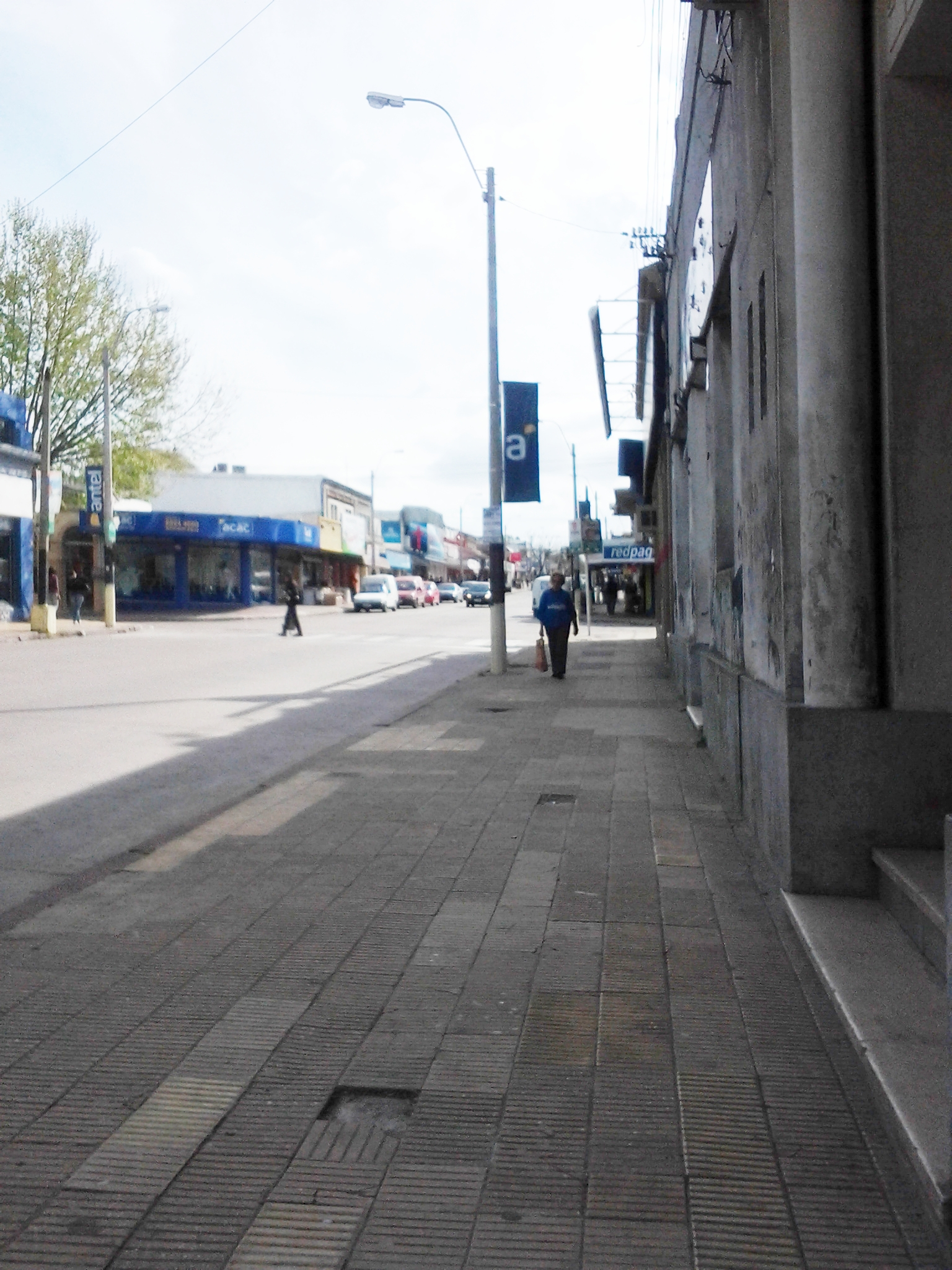 Calle José Batlle y Ordóñez de La Paz (Canelones-Uruguay)